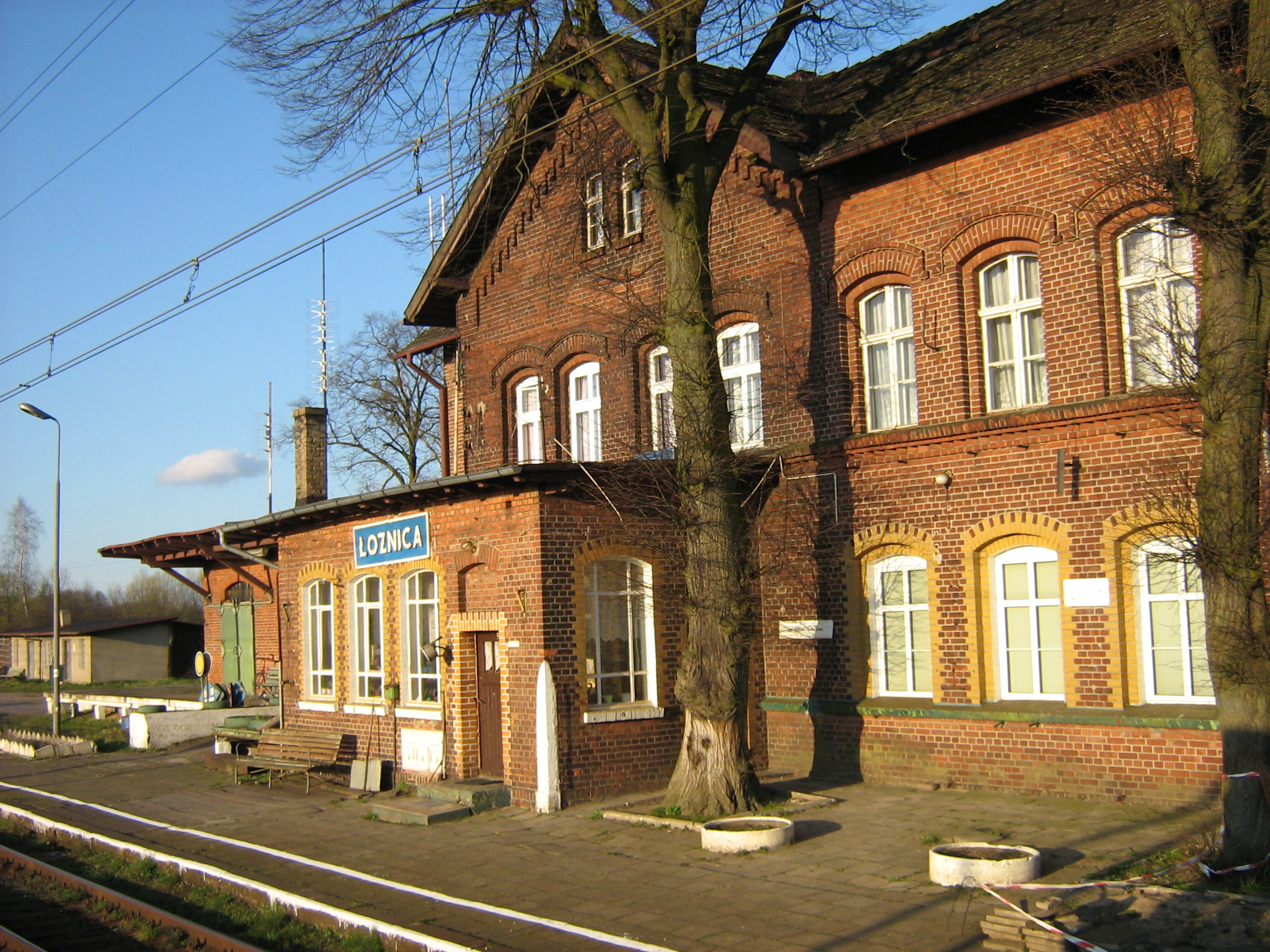 Stacja kolejowa w Łożnicy (Polska)